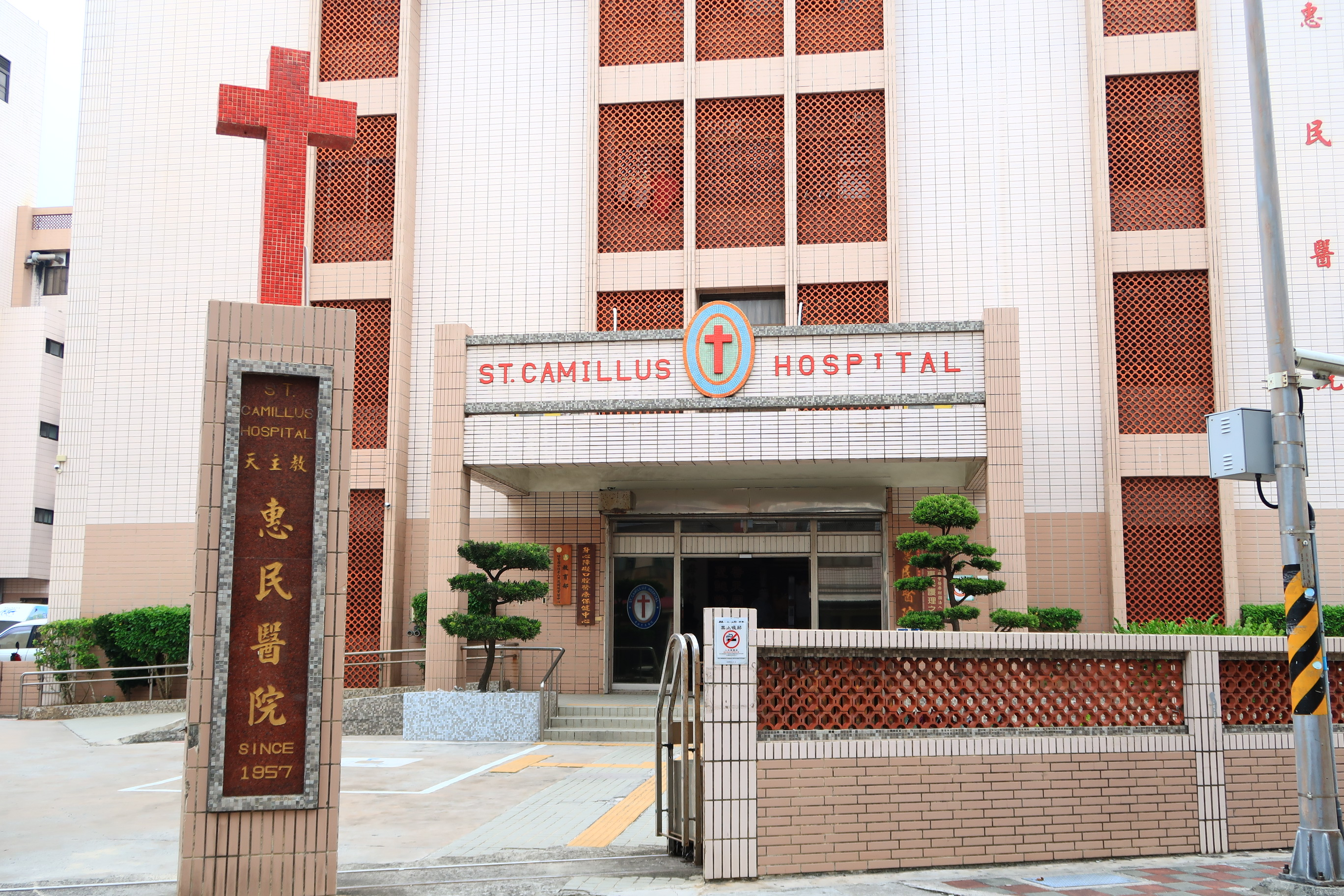 地址：台灣 880 澎湖縣馬公市樹德路14號